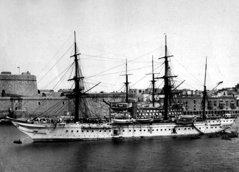 HMS Tamar, taken at Alexandria, c.1882